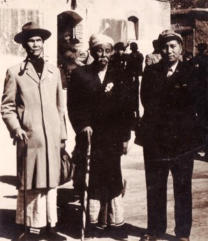 မြန်မာဘာသာ: Please do NOT delete this file. It's Copyright has expired according to Burma Laws. ၁၉၅၂ ခုနှစ် က တရုတ်နိုင်ငံ ပီကင်း ပစိဖိတ်ဒေသ ငြိမ်းချမ်းရေးကွန်ဖရင့် သို့ သခင်ကိုယ်တော်မှိုင်း၊ လူထုဦးလှ တို့နှင့်အတူ ဆရာကြီး ရွှေဥဒေါင်း တက်ရောက်ခဲ့စဉ်။ ဖဘ 376745_462259197128537_1235225549 မှ ရယူသည်။